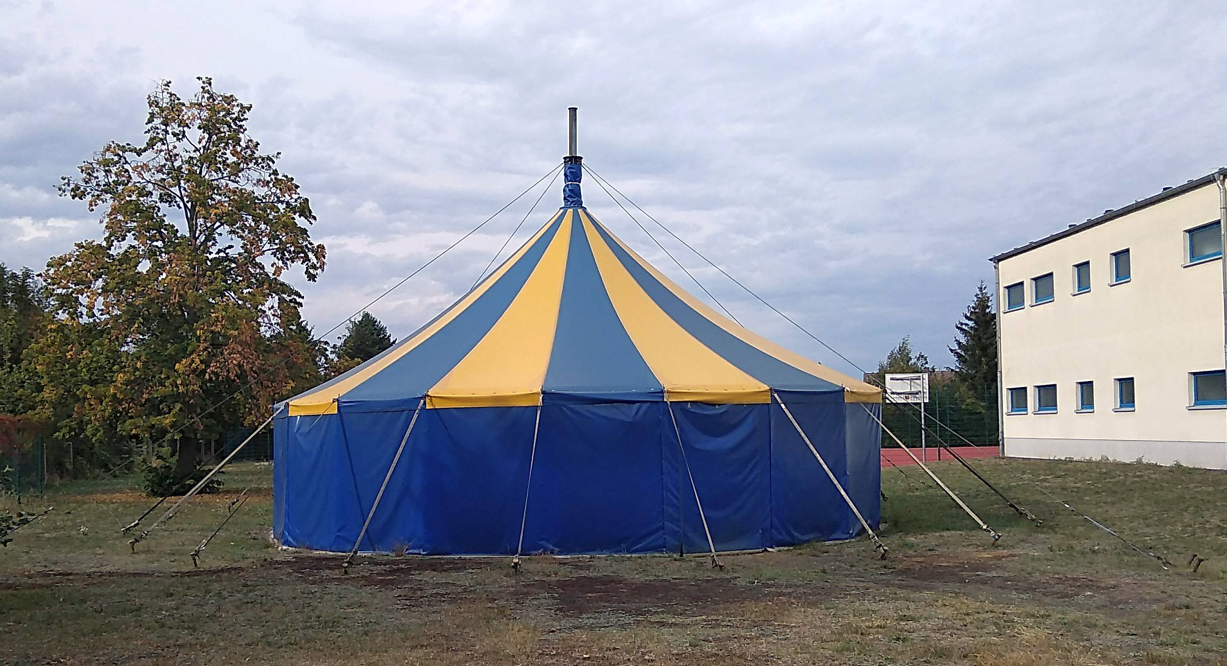 Das Zirkuszelt des Elsterschulzentrums in der Schulstraße in Elsterwerda.